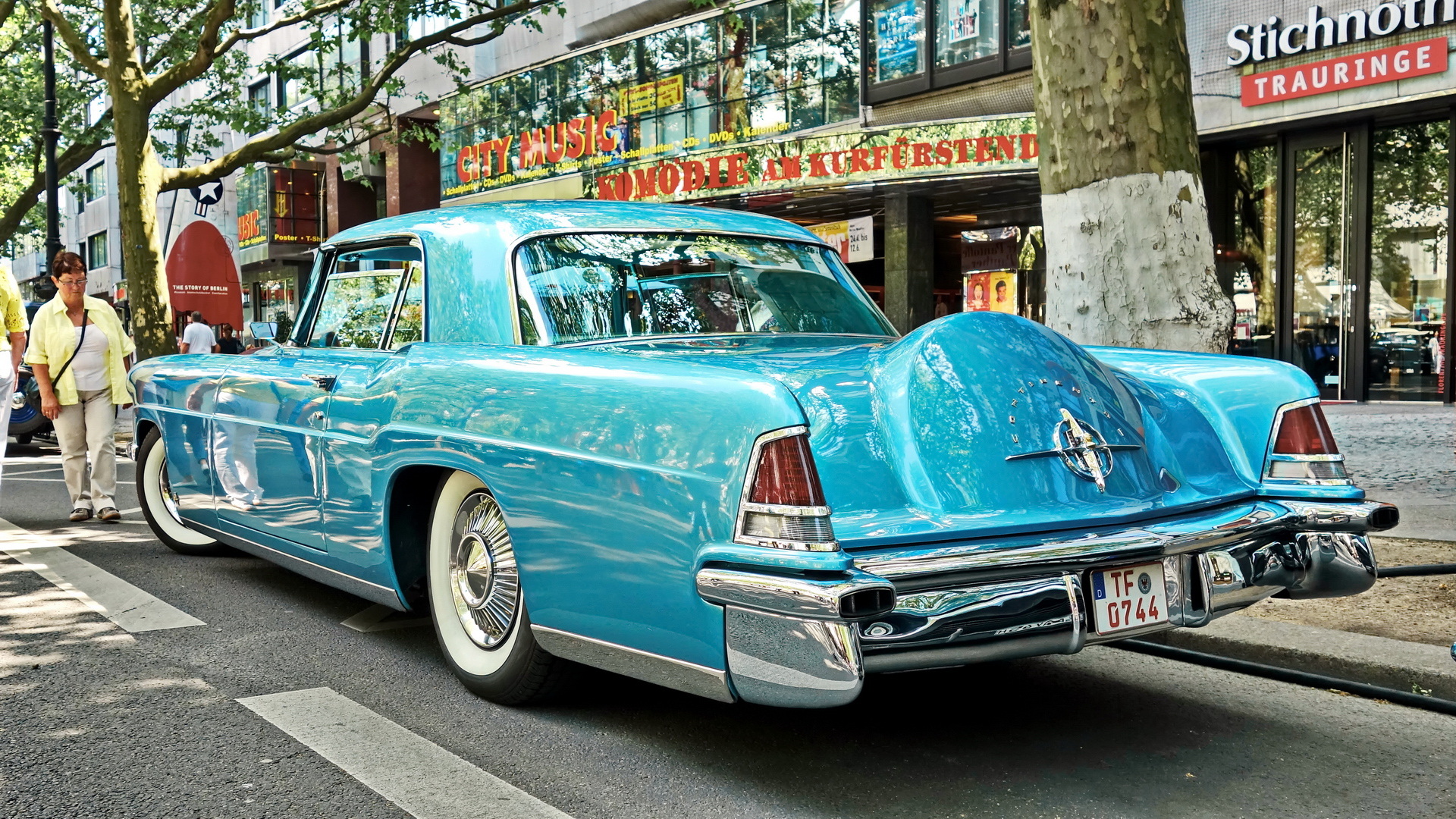 1956 Lincoln Continental